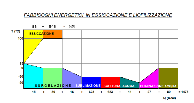 Indicazione grafica delle energie in gioco nei processi fisici di essiccazione e lioflizzazione